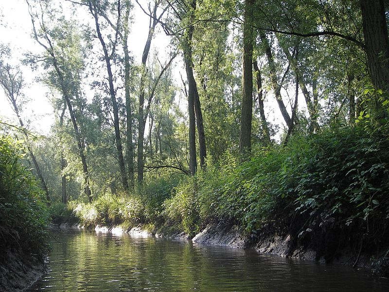 Kreek in de Hollandse Biesbosch (westelijk deel). Eigen foto Caseman juli 2006